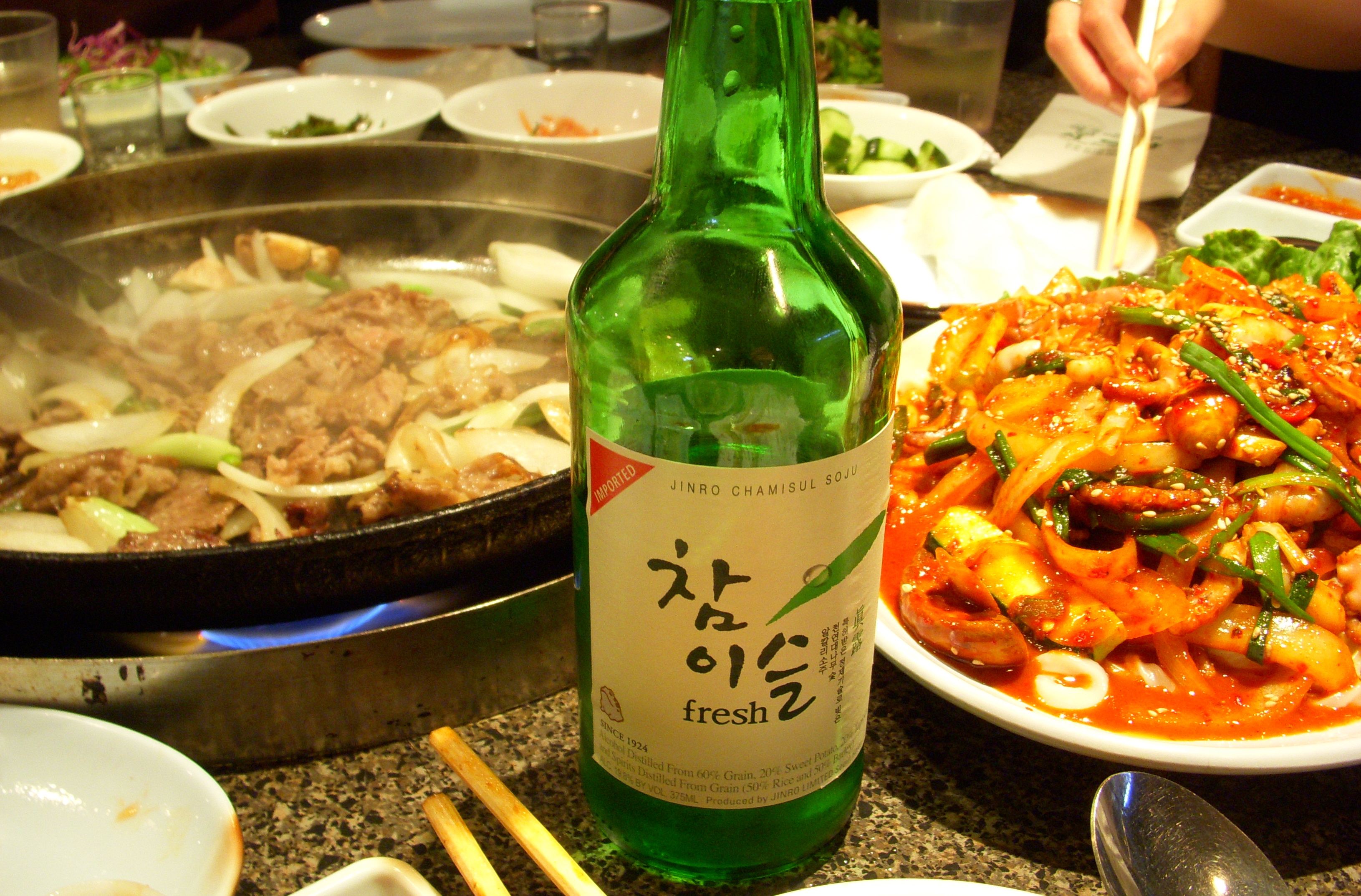 Bulgogi, soju (alcoholic drink) and Nakji bokkeum